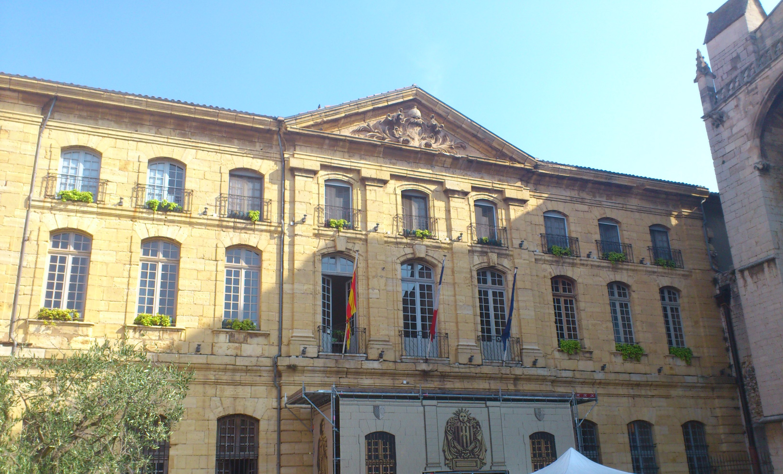 Hotel de ville Saint Maximin la Sainte Baume, crée par Jean-Baptiste Franque. This building is en partie classé, en partie inscrit au titre des Monuments Historiques. .